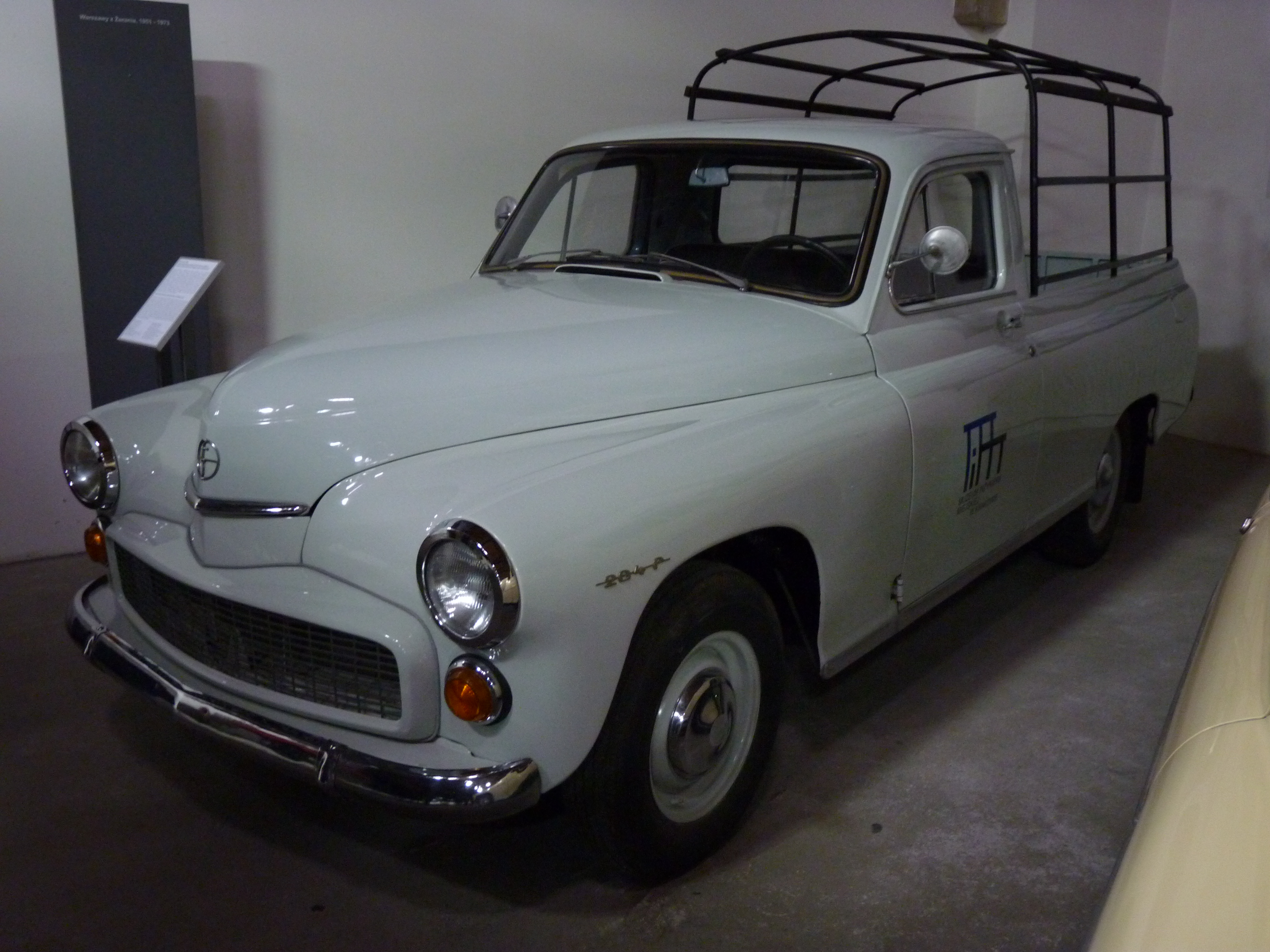 FSO Warszawa 204 P at Muzeum Inżynierii Miejskiej in Kraków